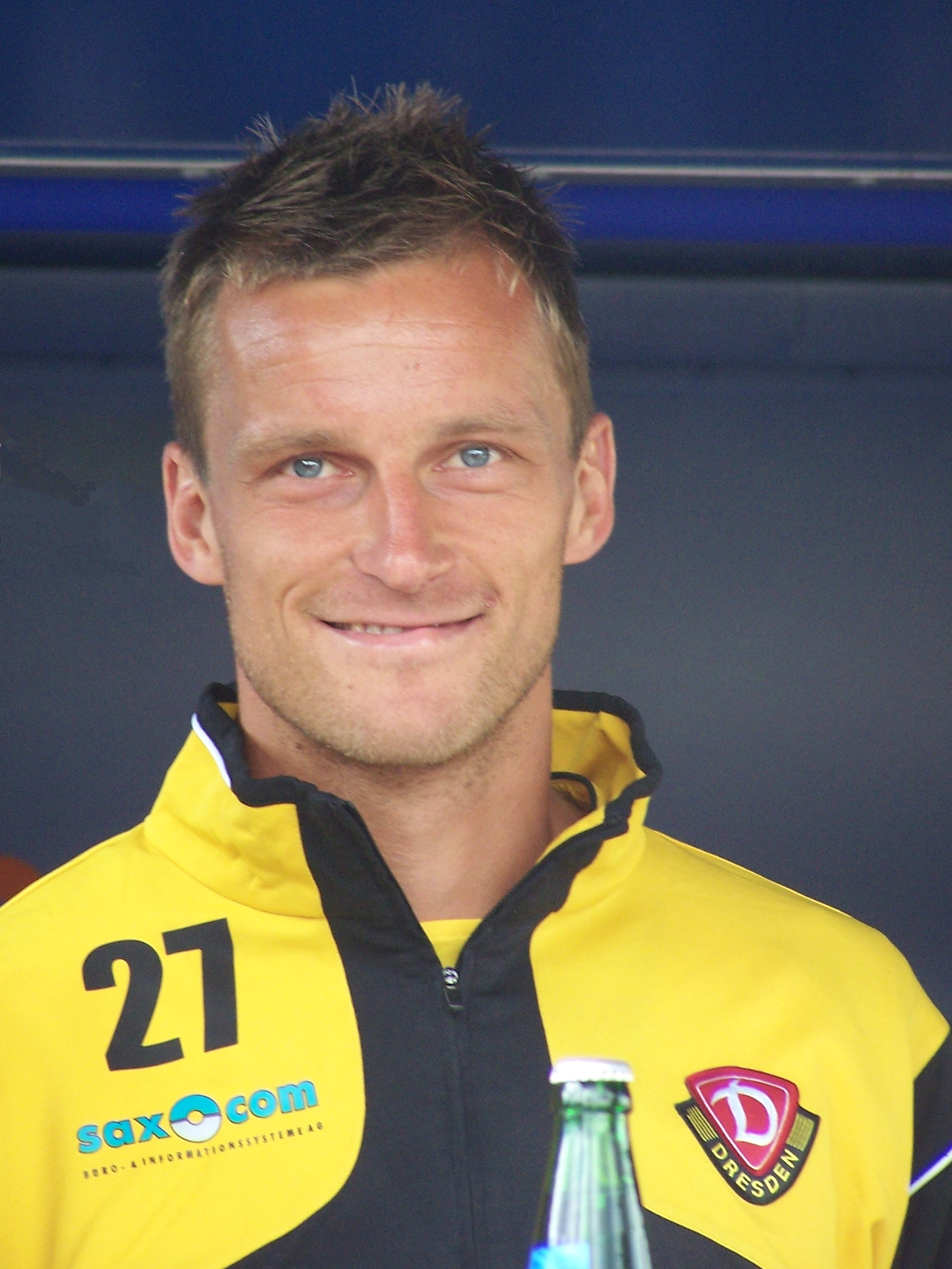 Ronny Nikol bei der Teampräsentation von Dynamo Dresden zum Start der Drittliga-Saison 2008/09